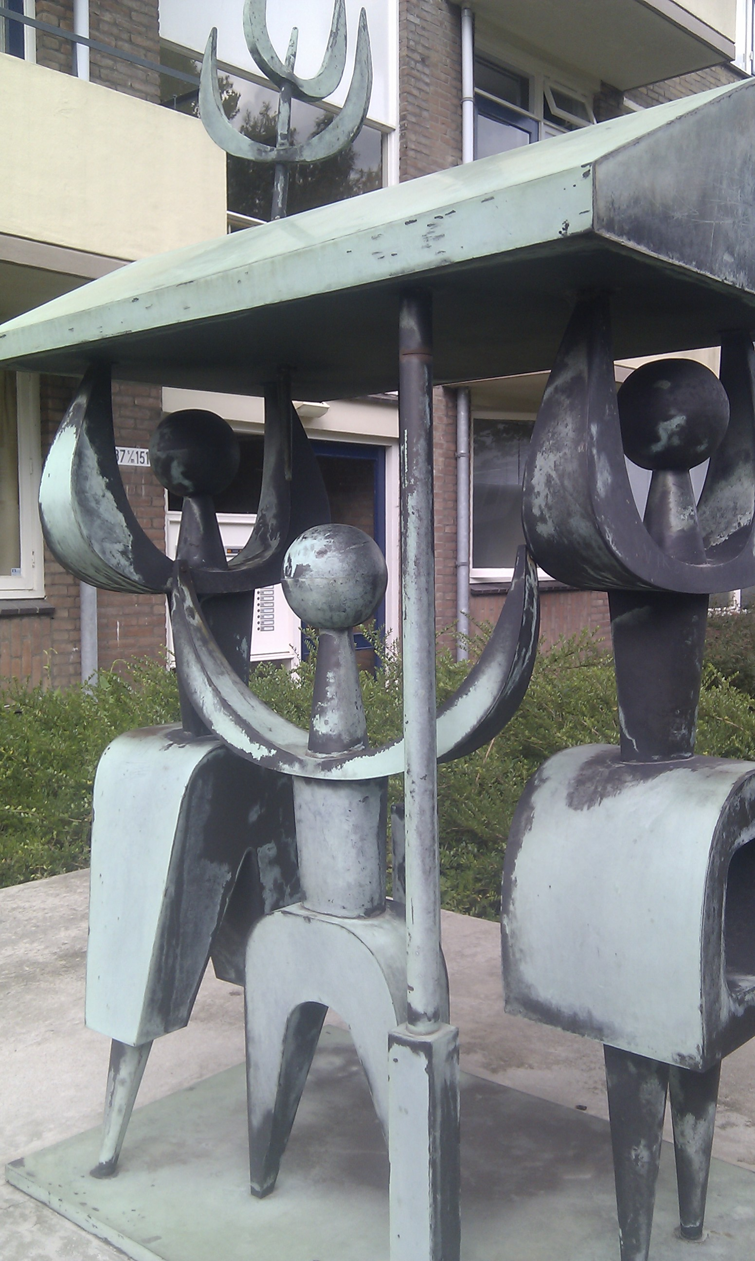 Kunstwerk Het Gezin (1964) van Henk Krijger aan de Hogenkamspweg in Zwolle.